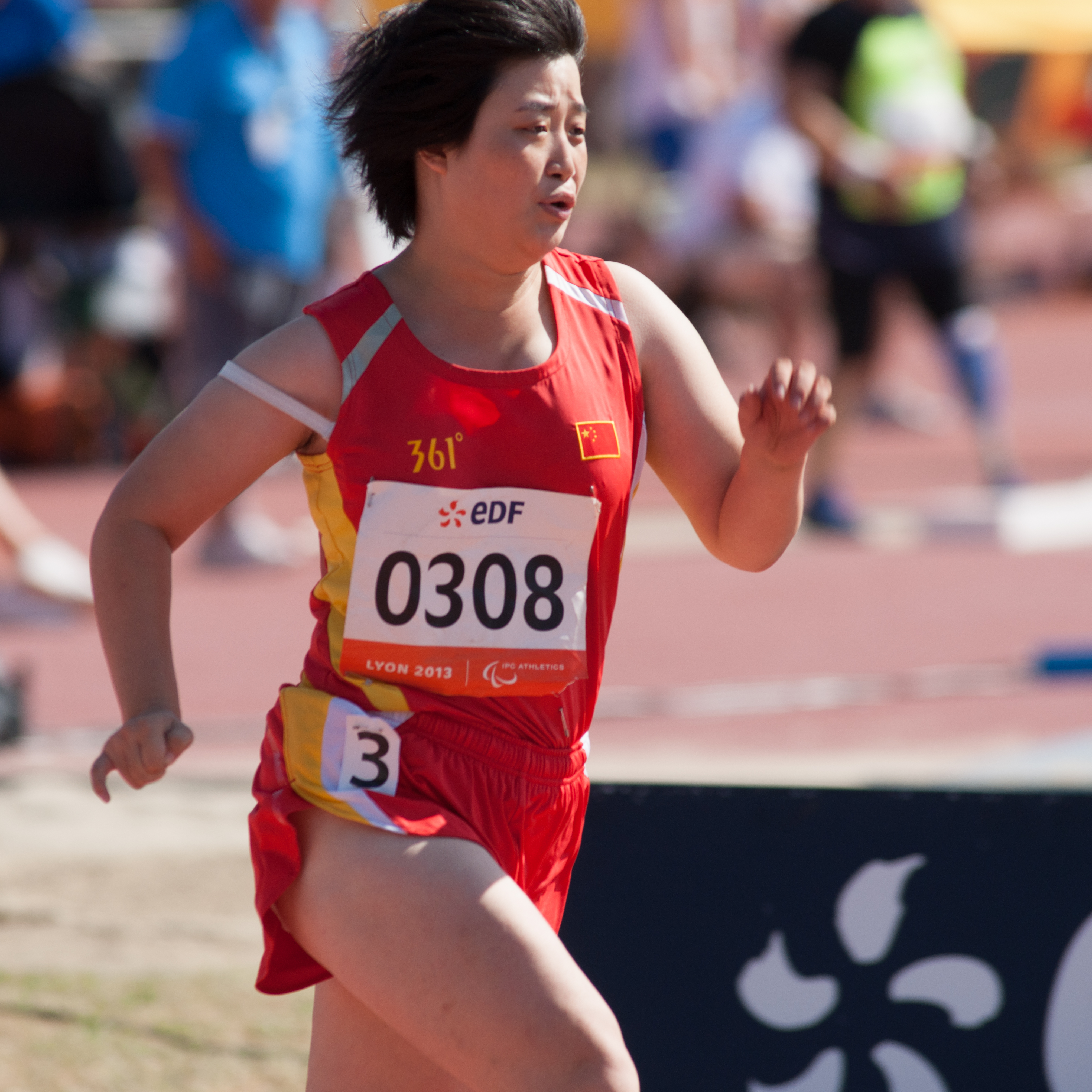 Championnats du monde d'athlétisme IPC 2013. 200 mètres féminin T35.